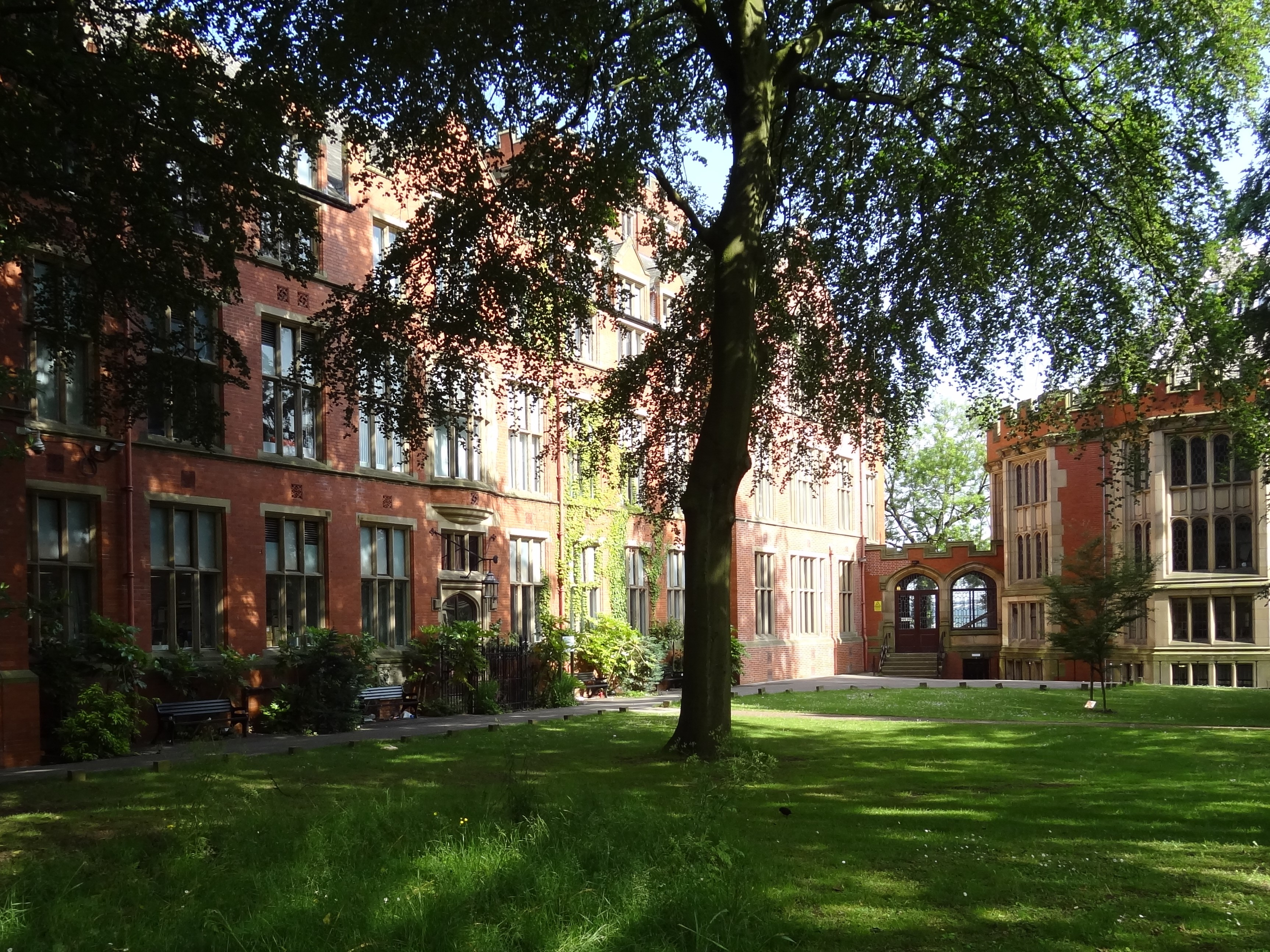 Edgar Allen Building, Firth Hall, Rotunda And Quadrangle